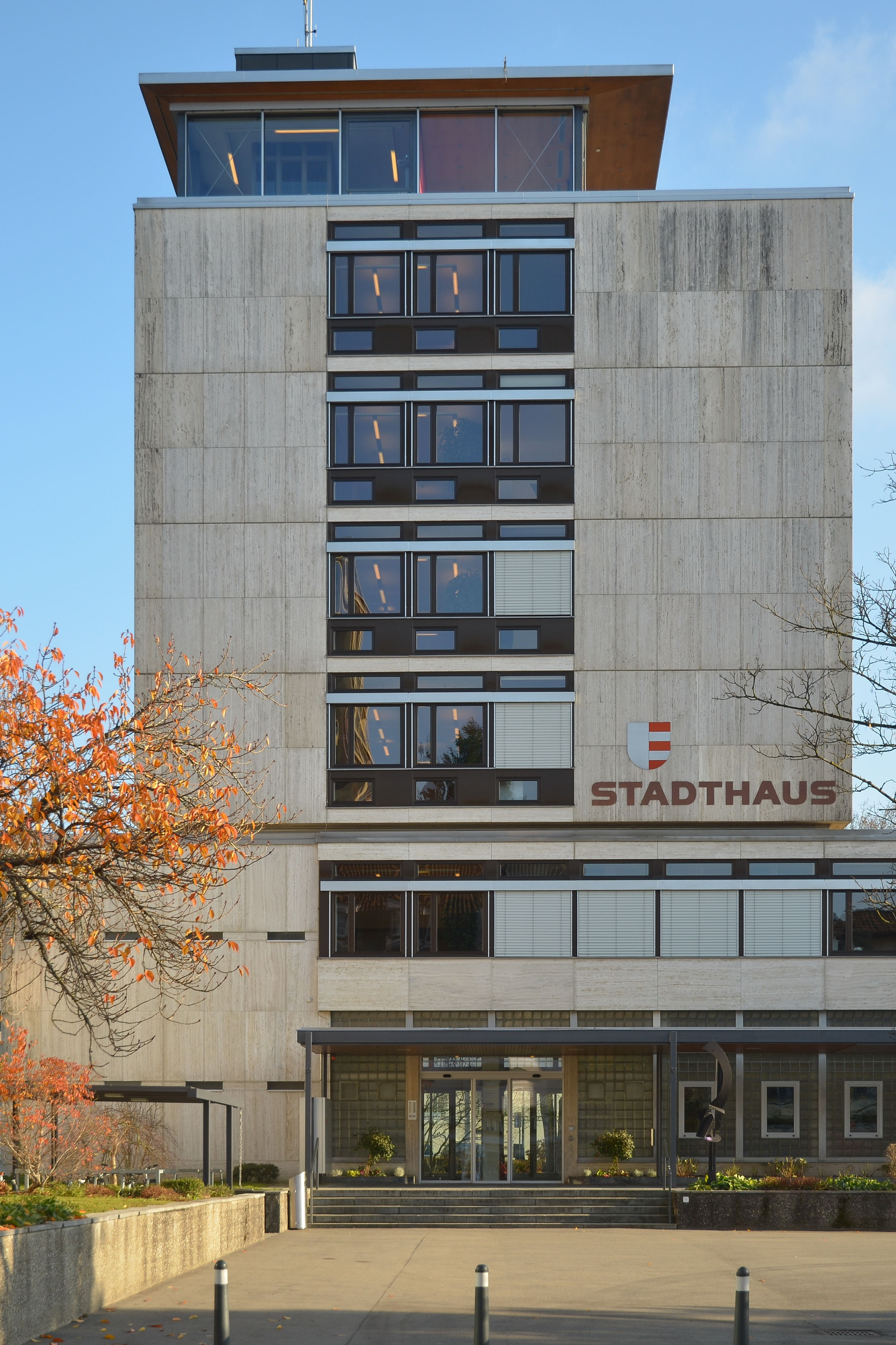 Stadthaus in Uster (Switzerland)